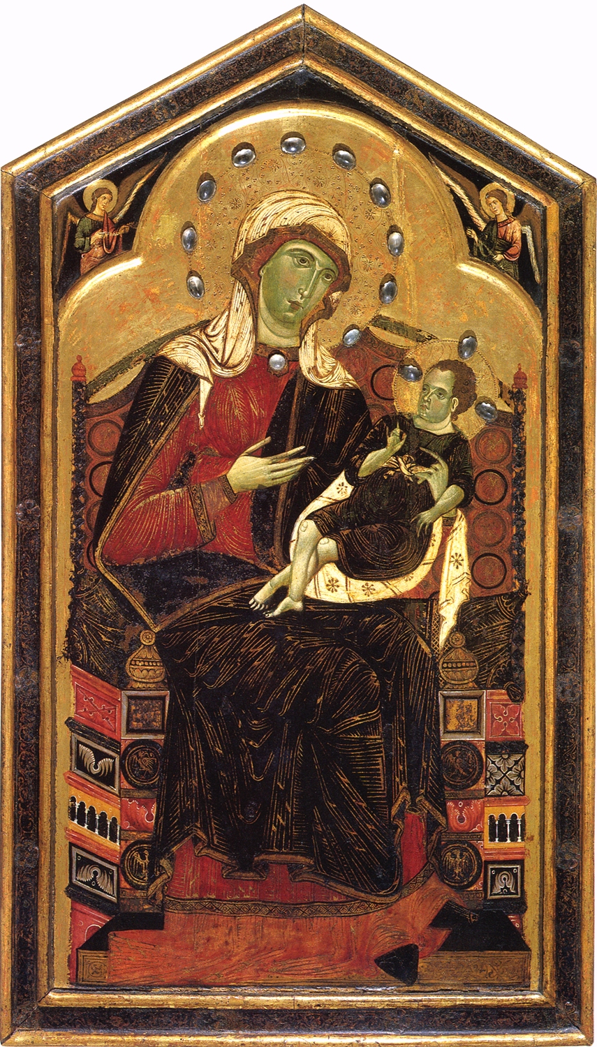 Madonna